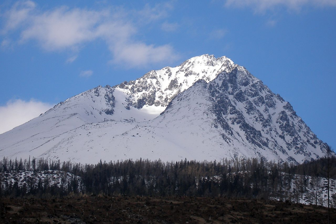 Pohľad z Tatranských Zrubov na masív Gerlachovského štítu